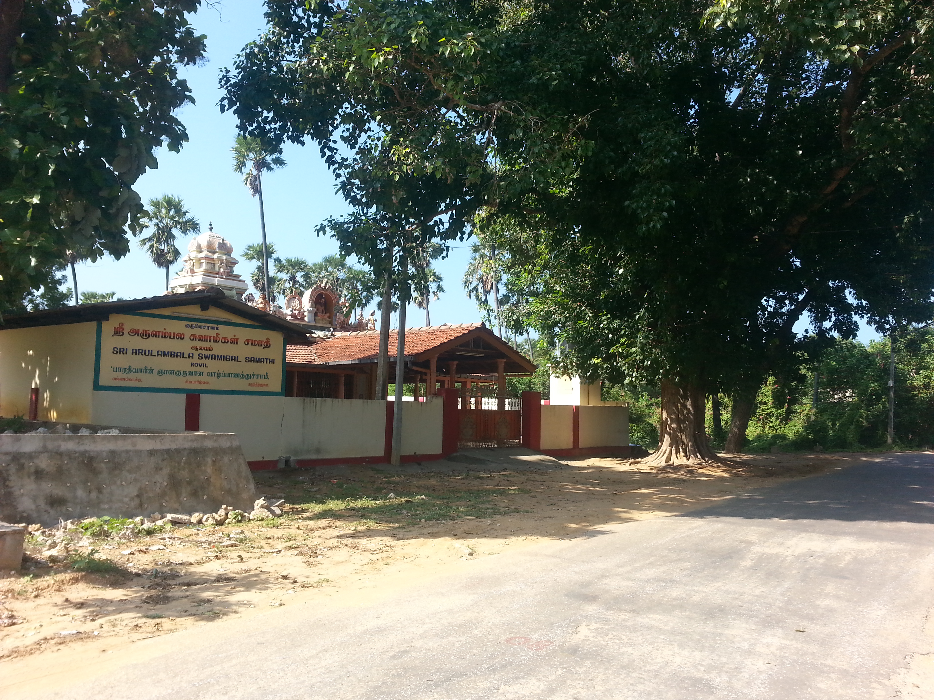 வியாபாரிமூலையில் அமையப்பெற்றுள்ள மௌனகுரு அருளம்பல சுவாமிகள் அவர்களின் சமாதி